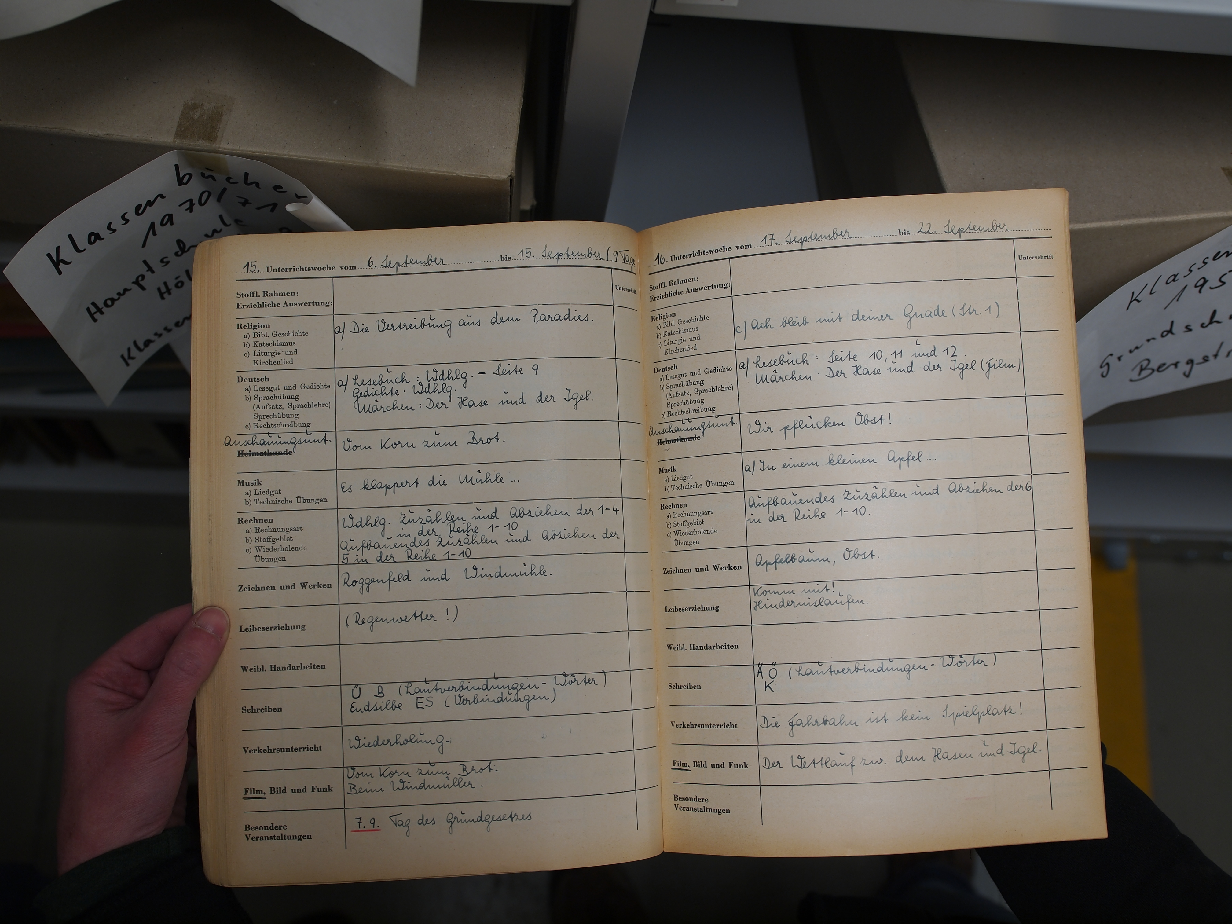 Stadtarchiv Herne, Klassenbuch aus einer Grundschule, fotogtrafiert anlässlich des Wikipedia Stammtisches Ruhrgebiet in Herne